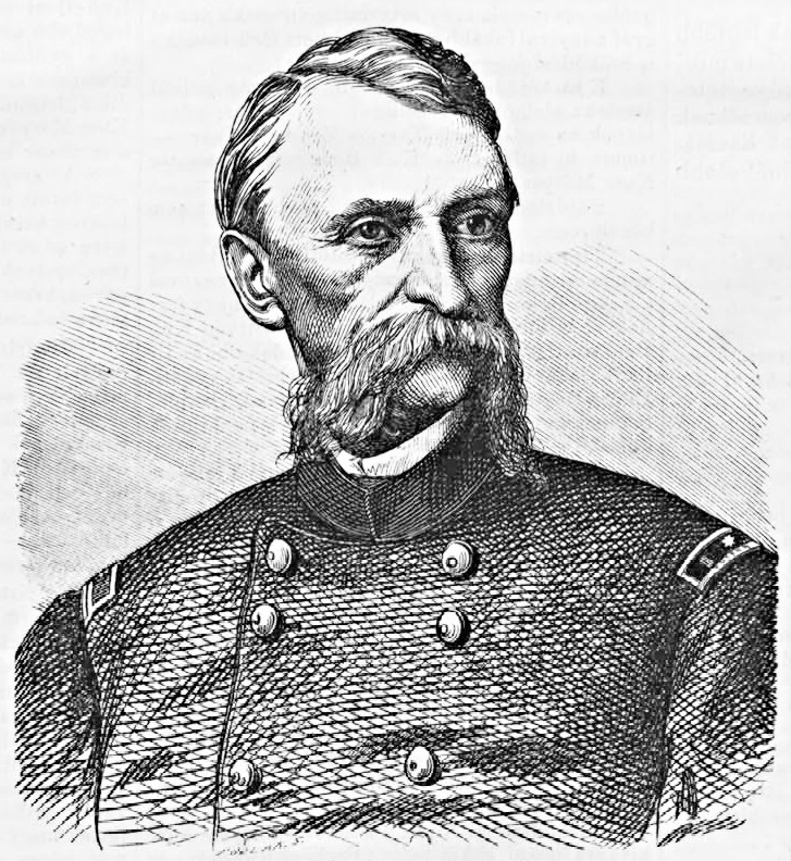 Asbóth Sándor (1810–1868) honvéd alezredes amerikai dandártábornok, diplomata portréja